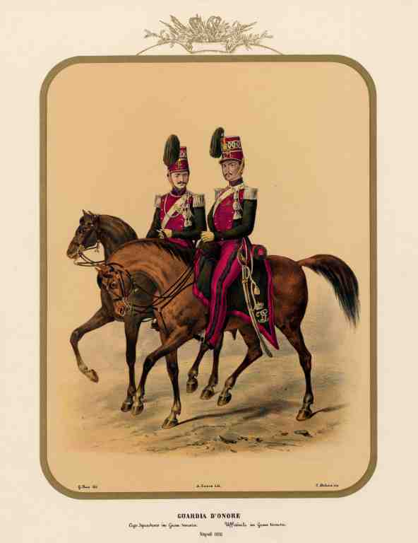 Guardia d'onore in gran tenuta Capo squadrone e ufficiale dell'Esercito delle Due Sicilie (1853)